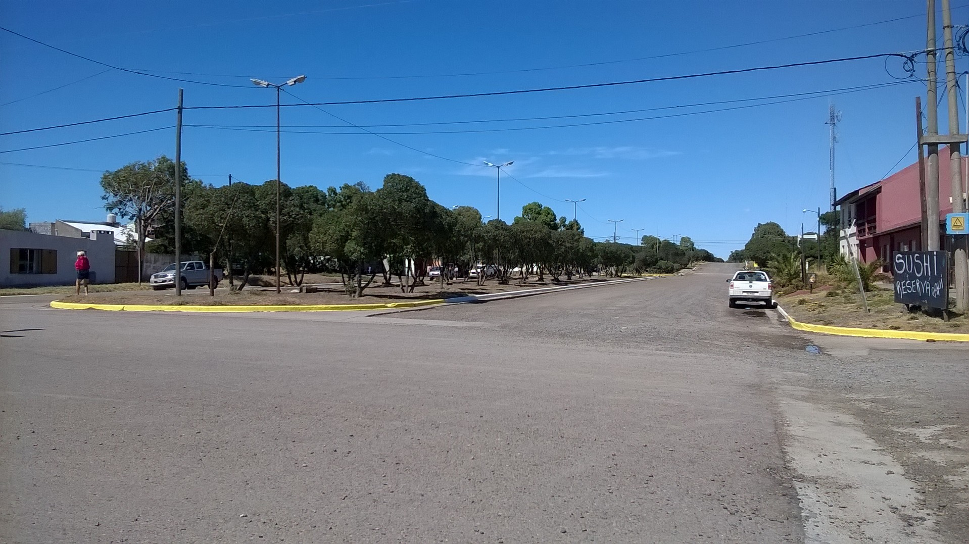 Intercessión de Bulevar de acceso con Costanera, Bahía San Blas, Partido de Patagones